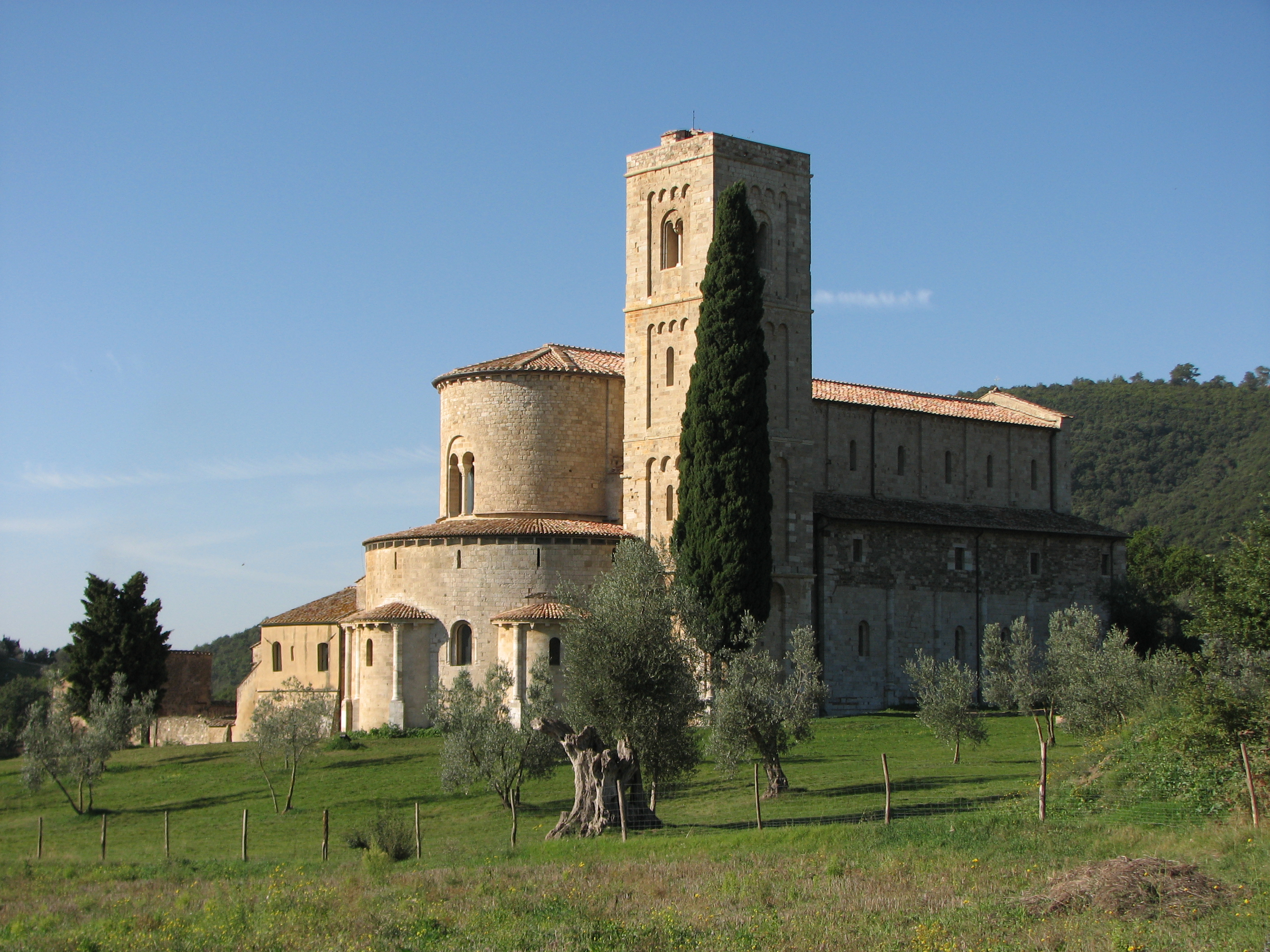 L'Abbazia di Sant'Antimo (Montalcino, Toscana, Italy)